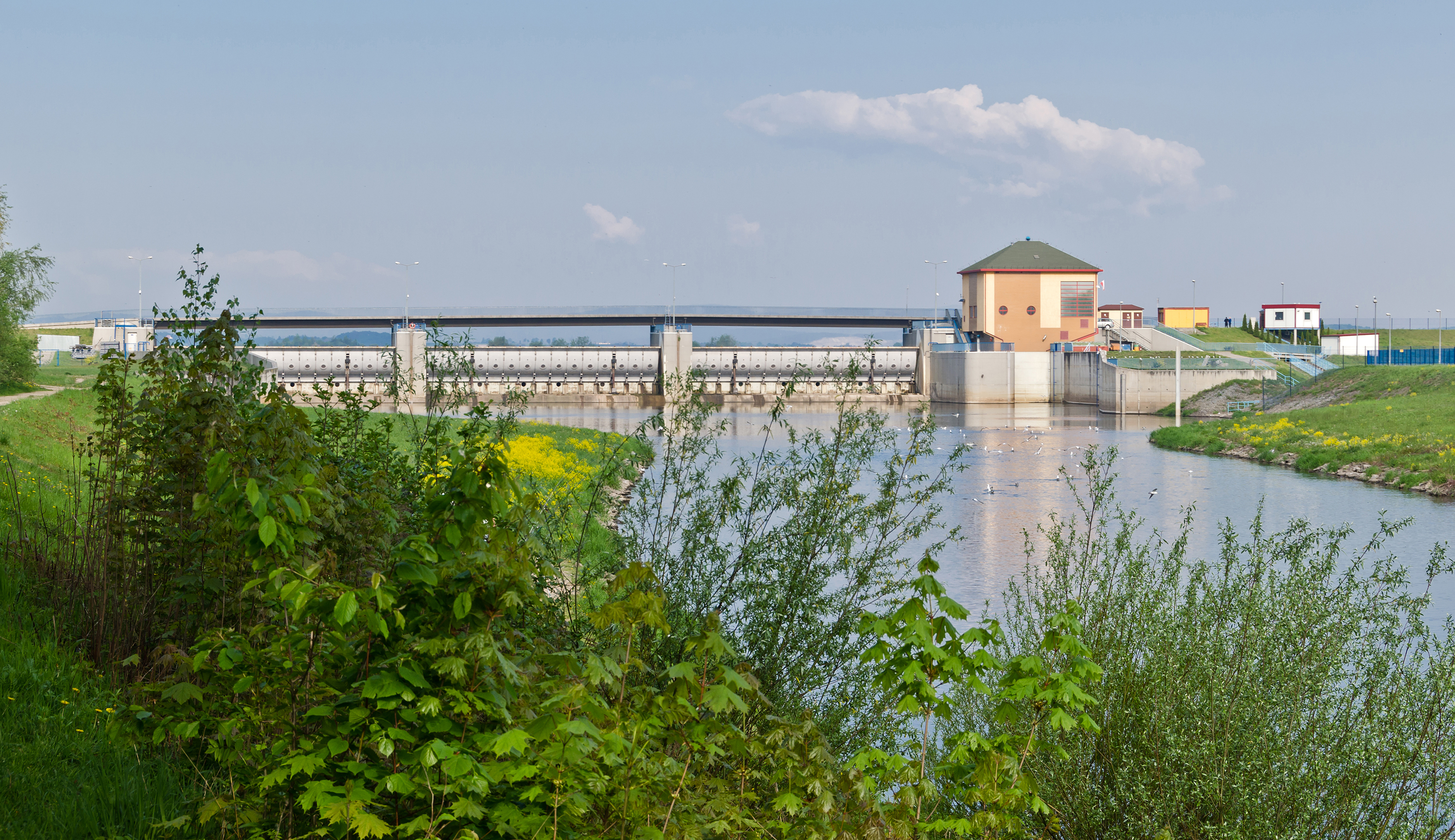 Zapora na Jeziorze Paczkowskim, w Kozielnie